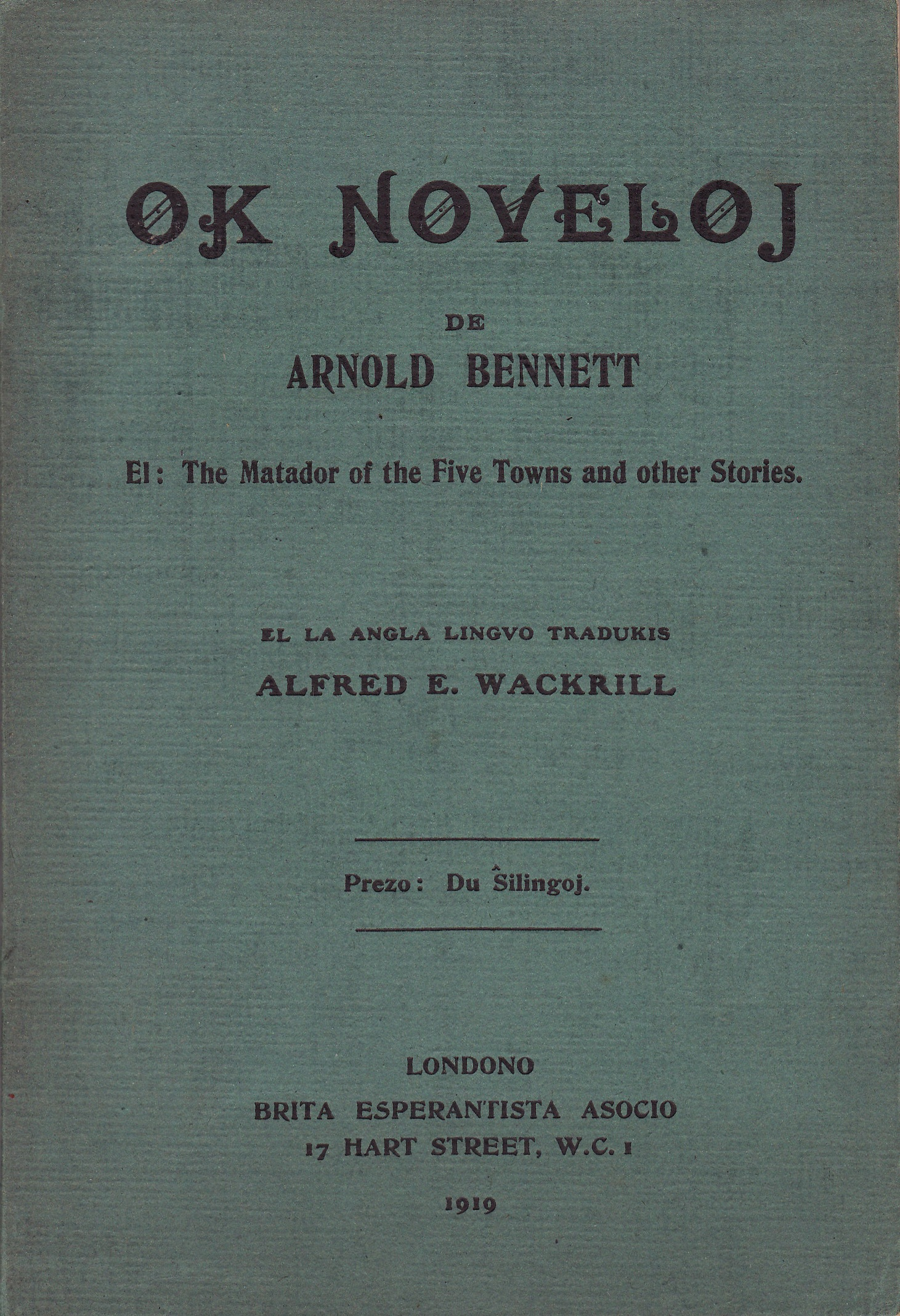 kovrilo de "Ok Noveloj", 1919